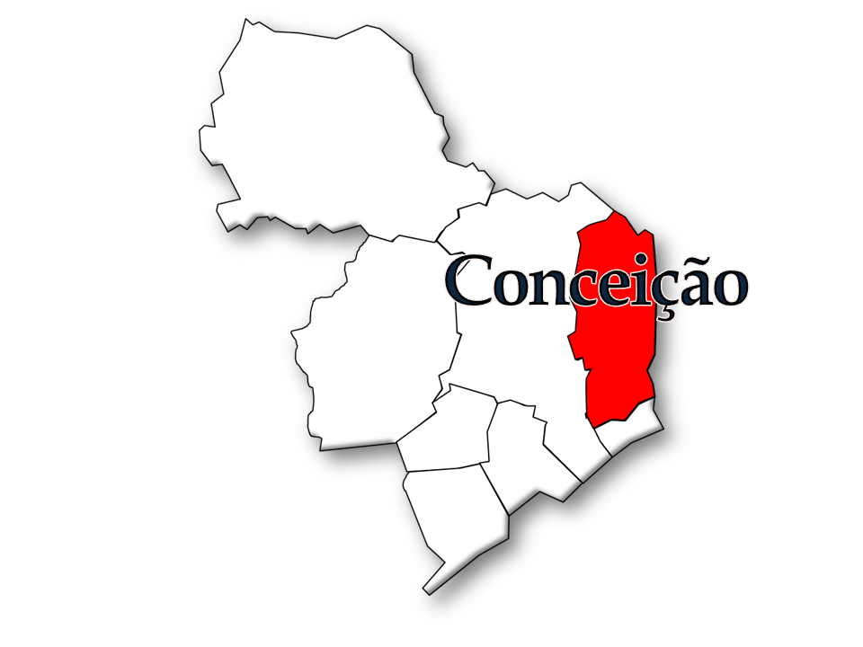 Censos 1864/2011